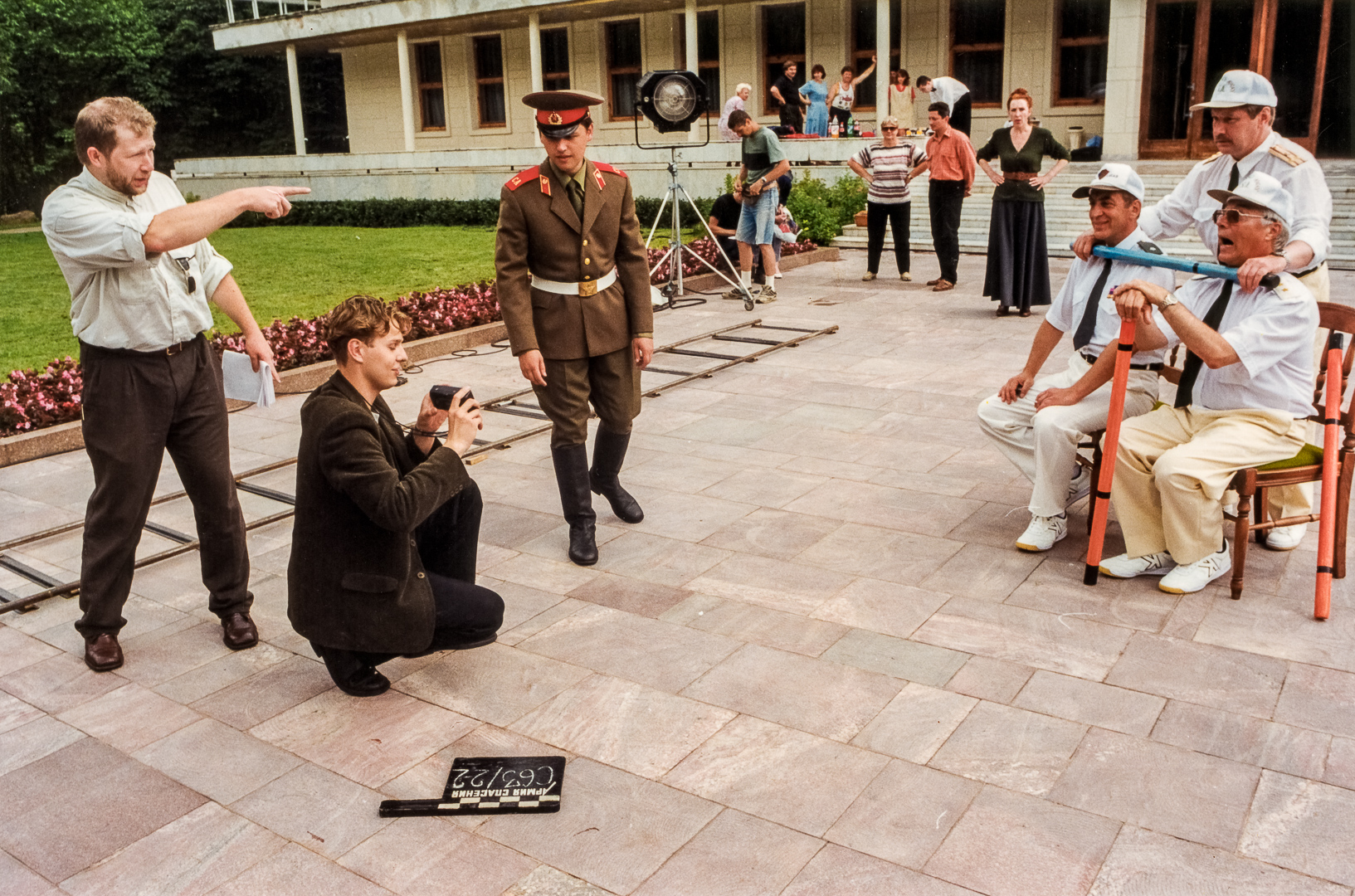 Евгений Кравцов (слева), Евгений Жариков, Олег Шкловский, Семен Морозов (справа) на съемках фильма "Армия Спасения". Минск, 1999 год.